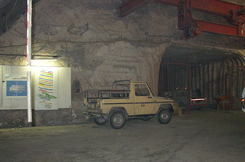 Fahrzeug in der Asse (490m)